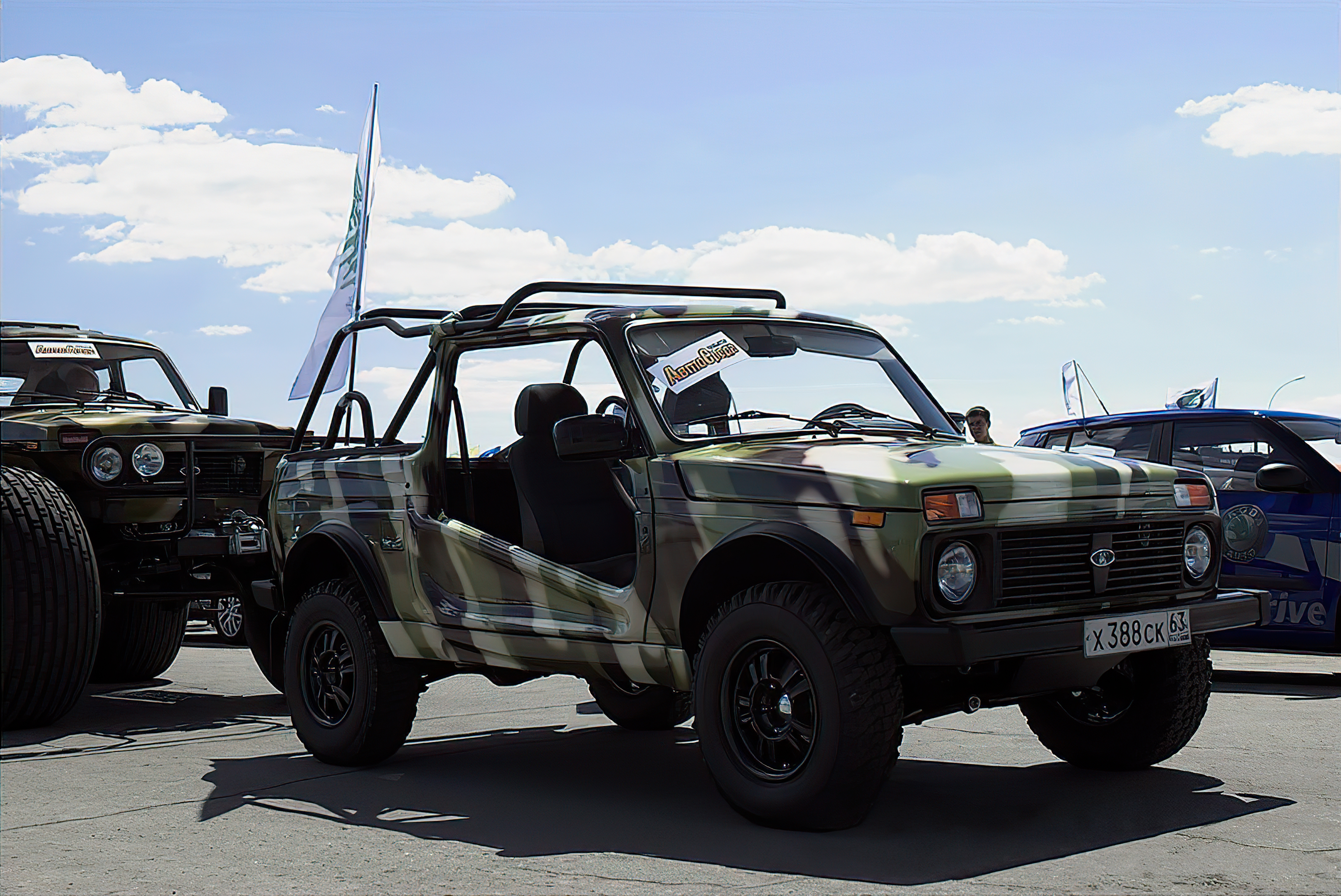 Автомобиль "Нива" с кузовом "ландоле"